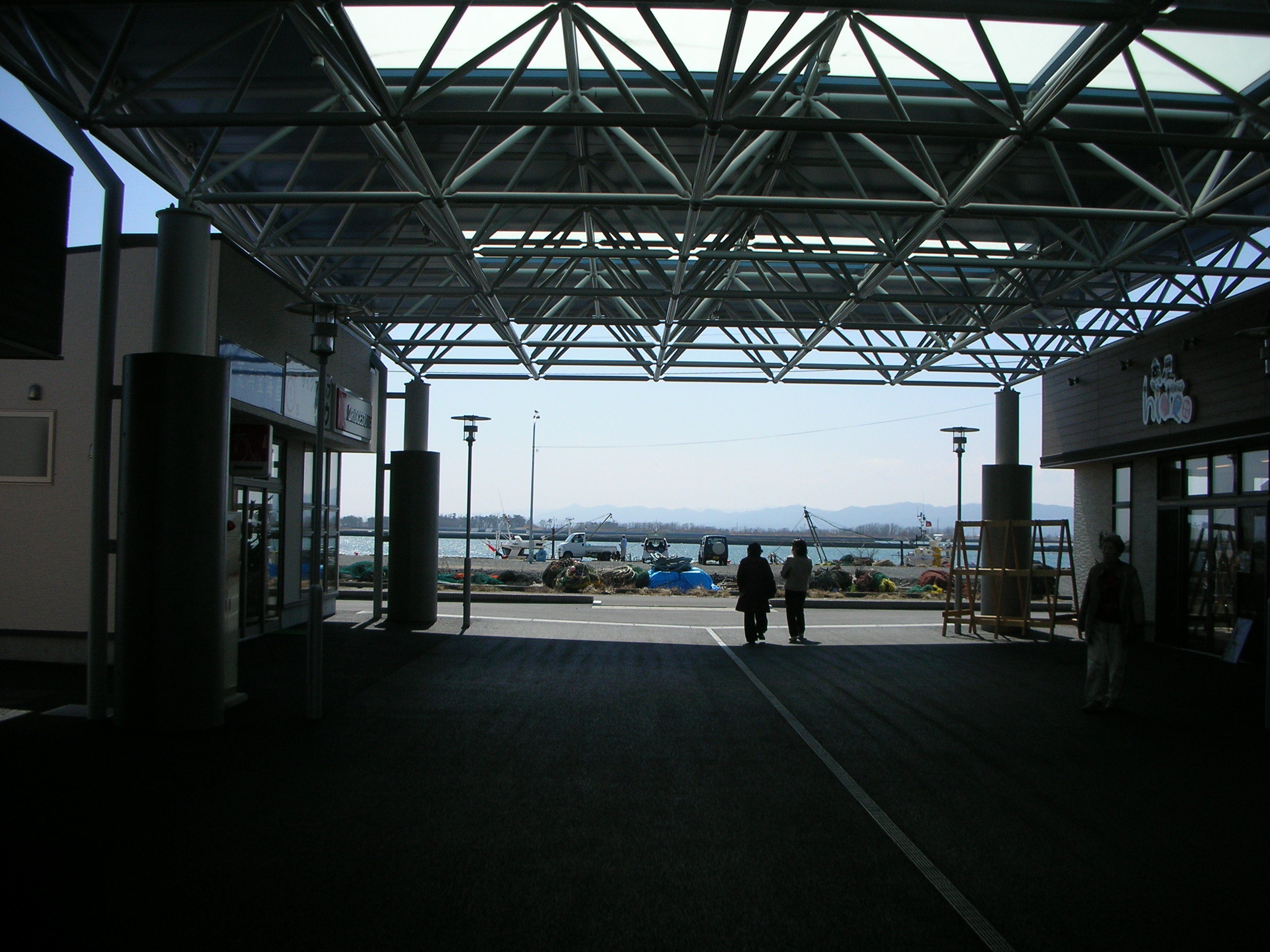 荒浜にぎわい回廊商店街